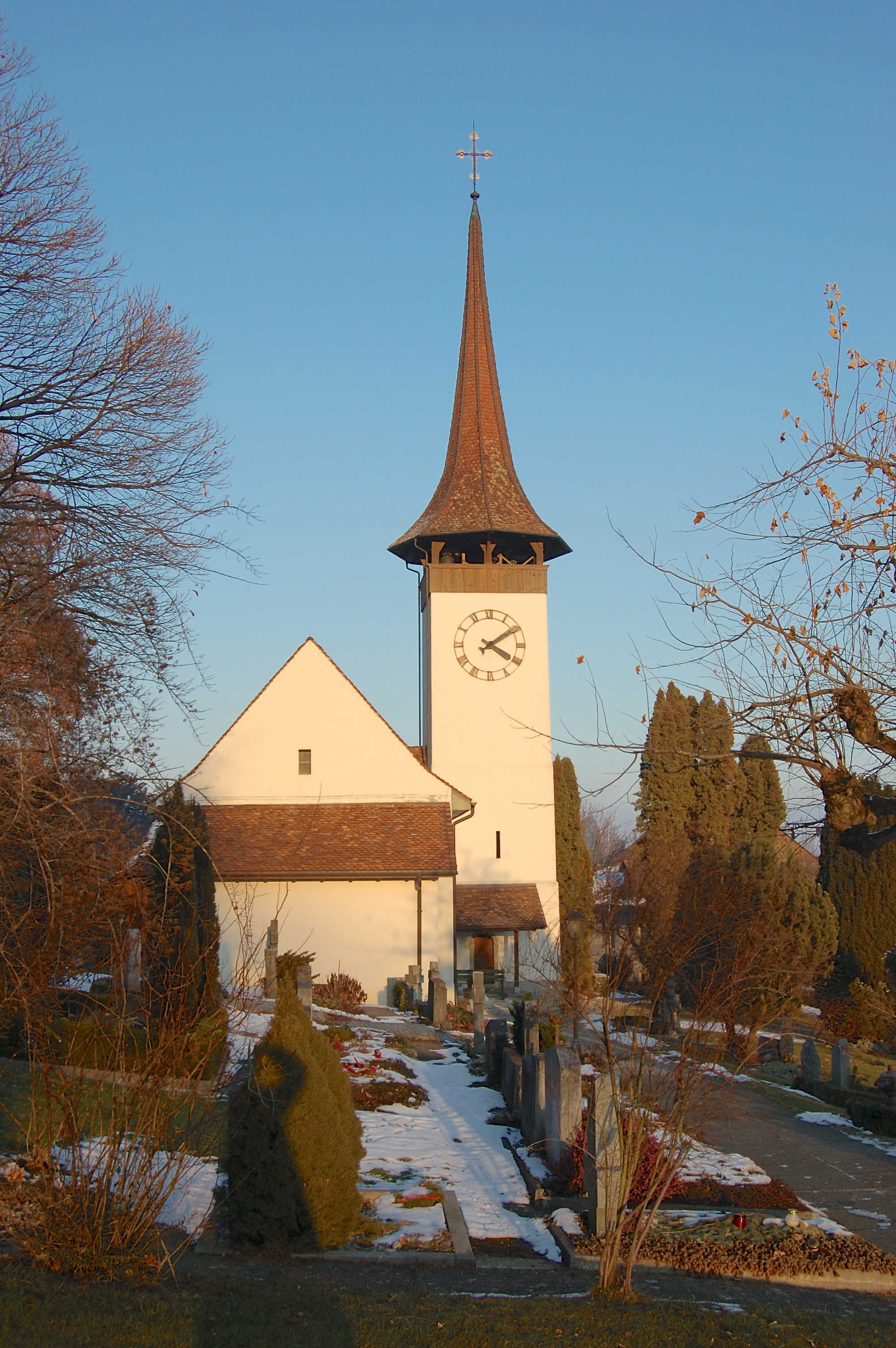 Kirche Gerzensee von Westen, vom unteren Friedhof aus gesehen